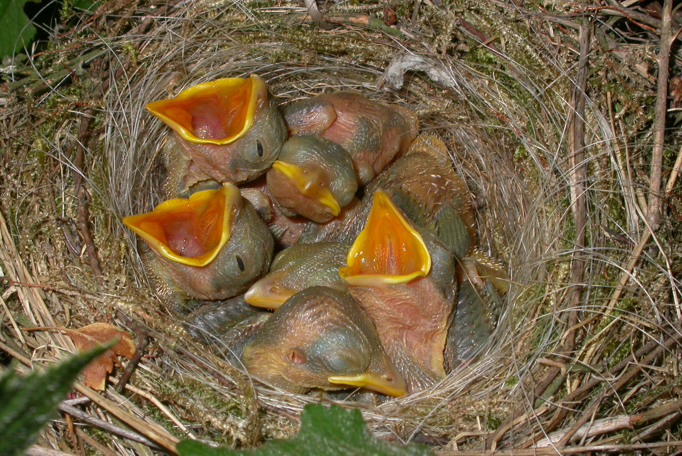 Lanius collurio